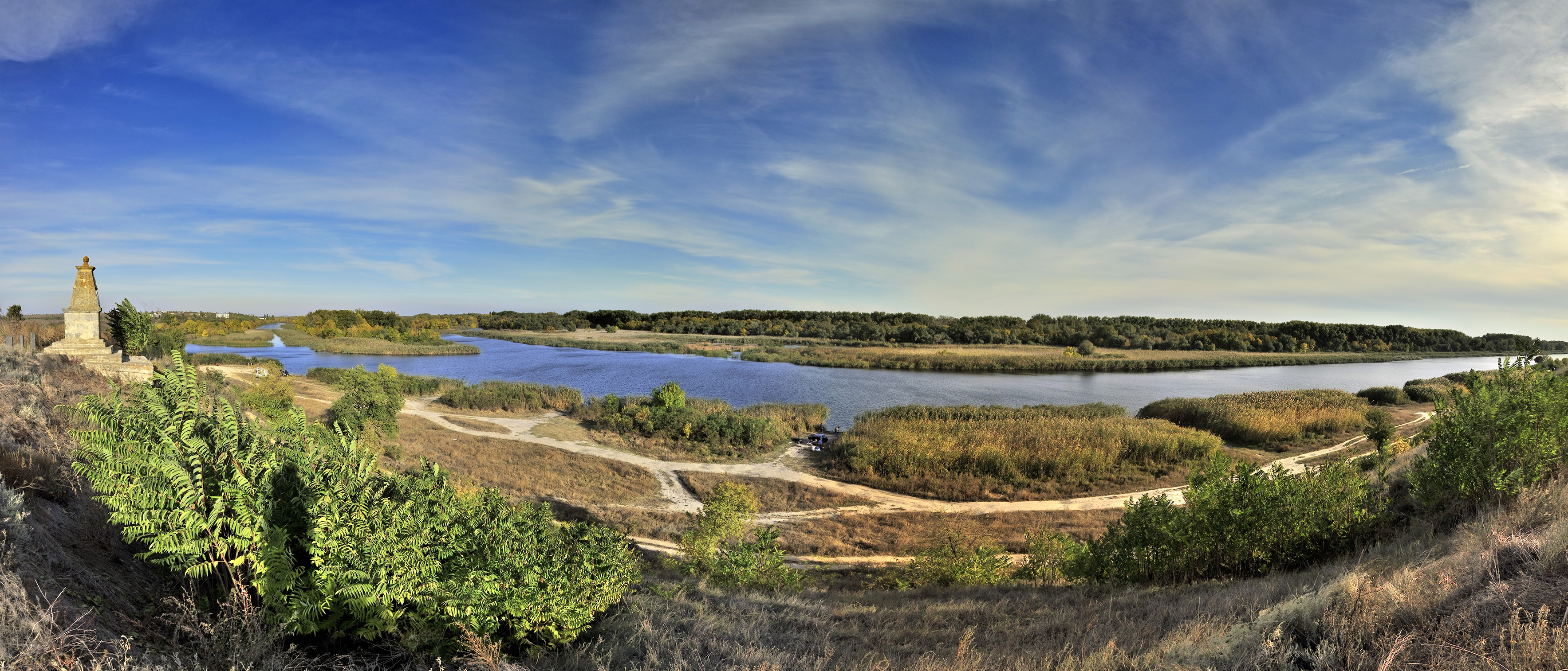 Пам'ятник на честь генерал-майора М.М.Синельникова, с. Садово